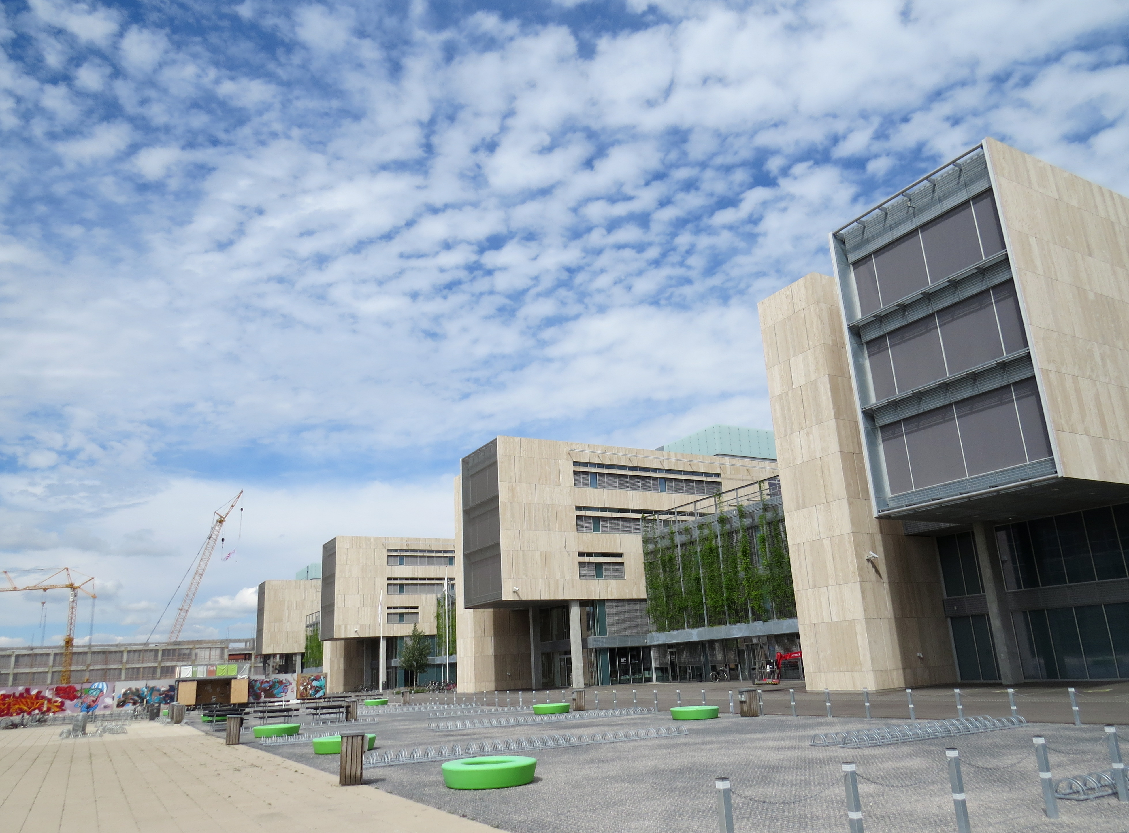 Københavns Universitet, Det Humanistiske Fakultet, Amager